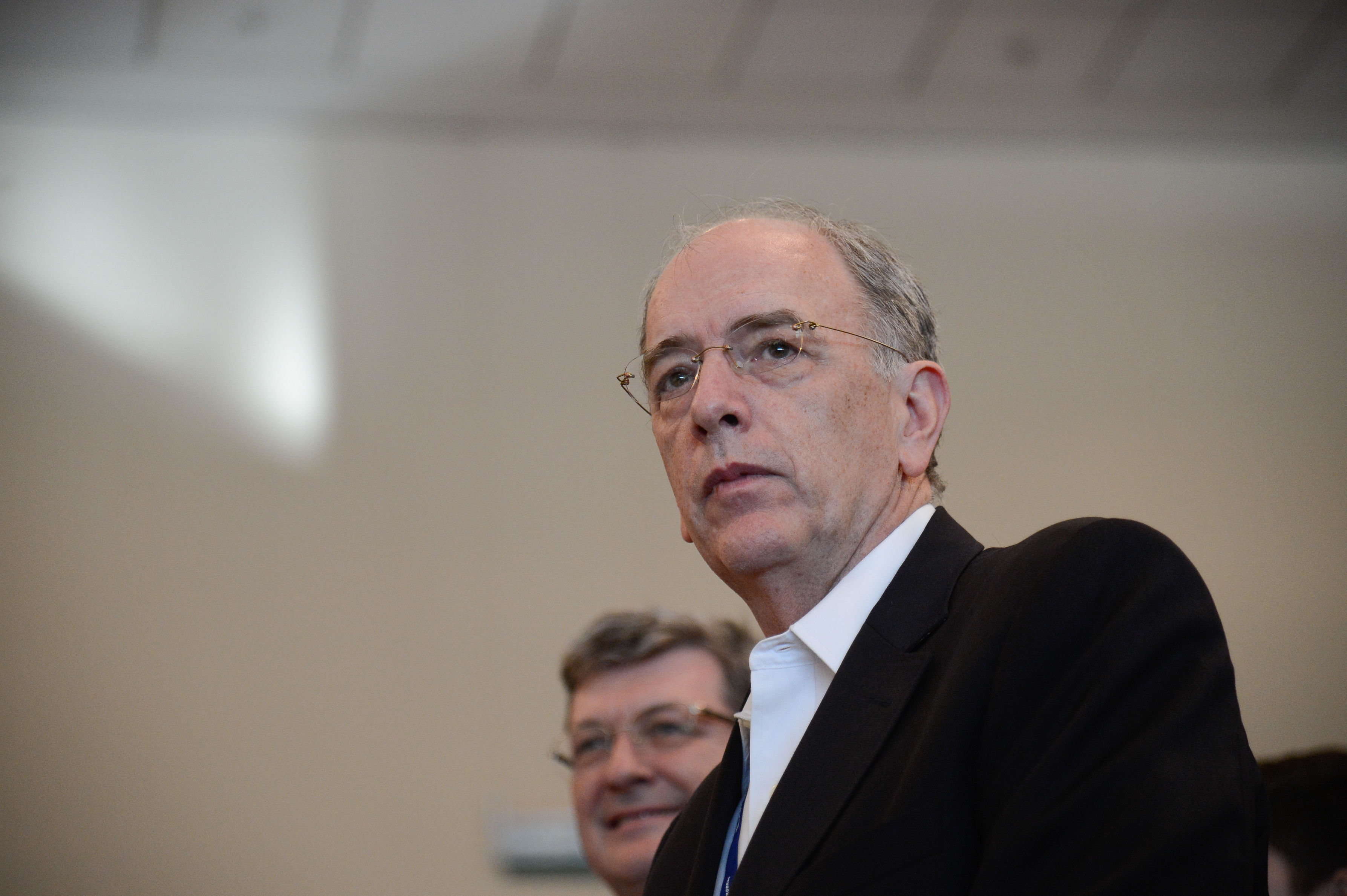 Rio de Janeiro - O presidente da Petrobras, Pedro Parente, recebe atletas olímpicos que representam o Brasil nos Jogos Rio 2016 patrocinados pela empresa (Fernando Frazão/Agência Brasil)